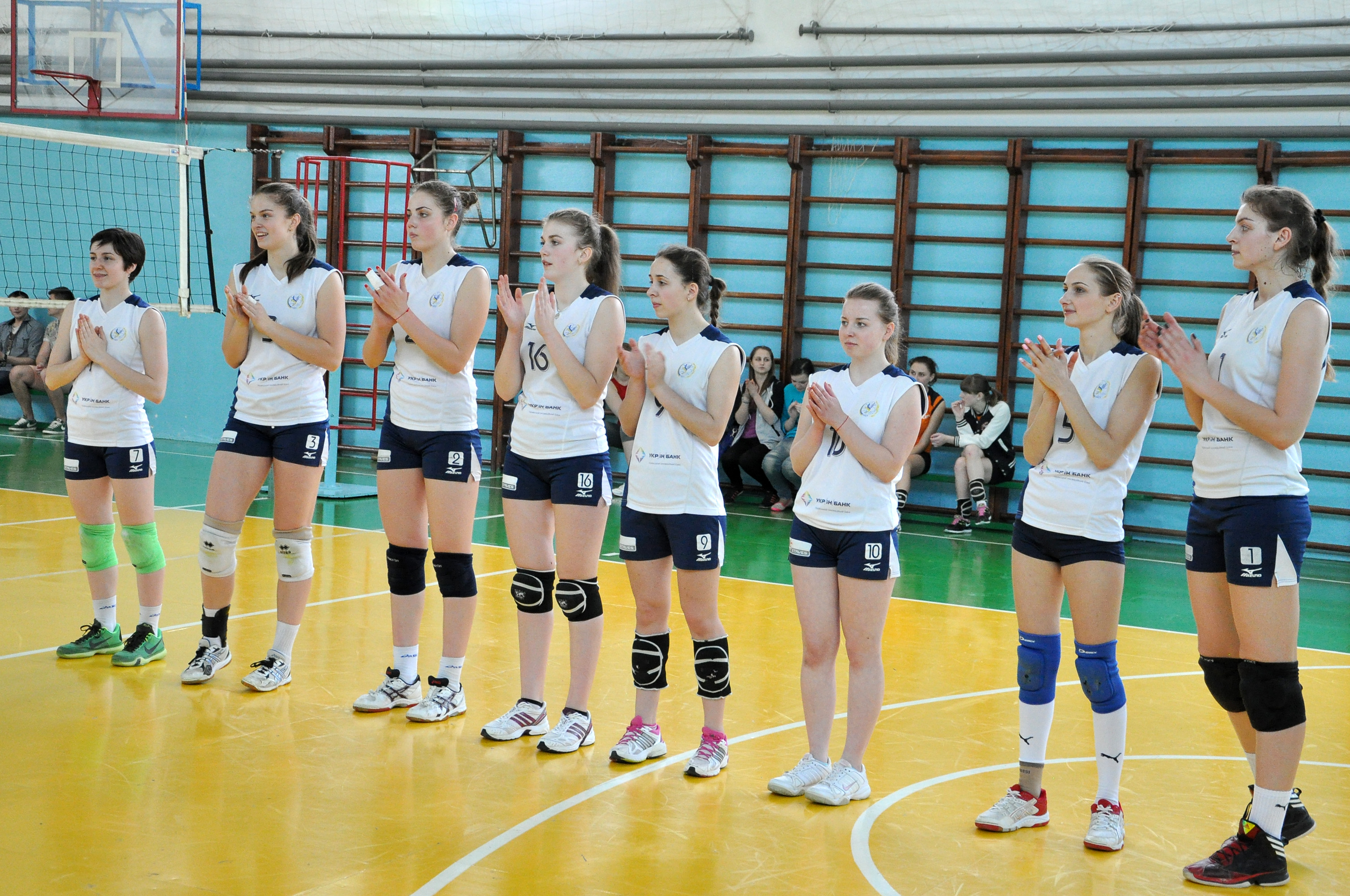 Жіноча волейбольна команда Тернопільського національного економічного університету Галичанка-ТНЕУ.